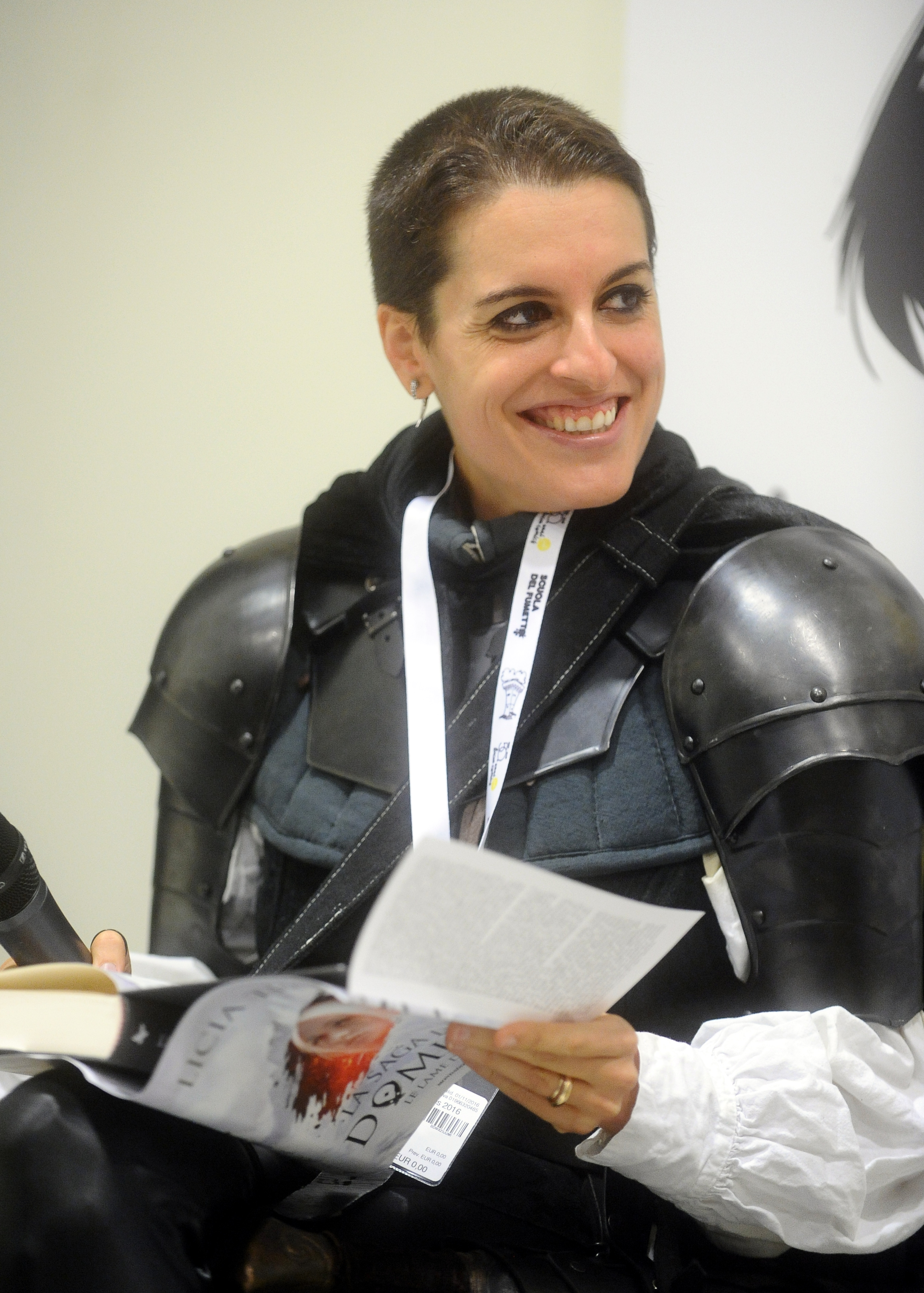 Licia Troisi (in cosplay) presenta il suo romanzo Le lame di Myra (primo libro della saga del Dominio) a Lucca Comics & Games 2016, durante una conferenza stampa in Camera di Commercio.